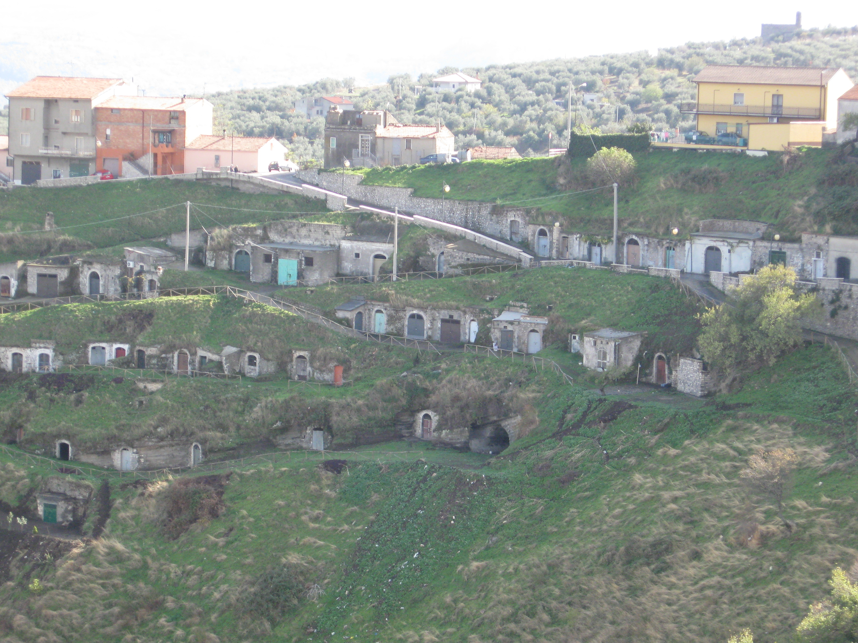 Le cantine (Seshe) di Barile, Basilicata